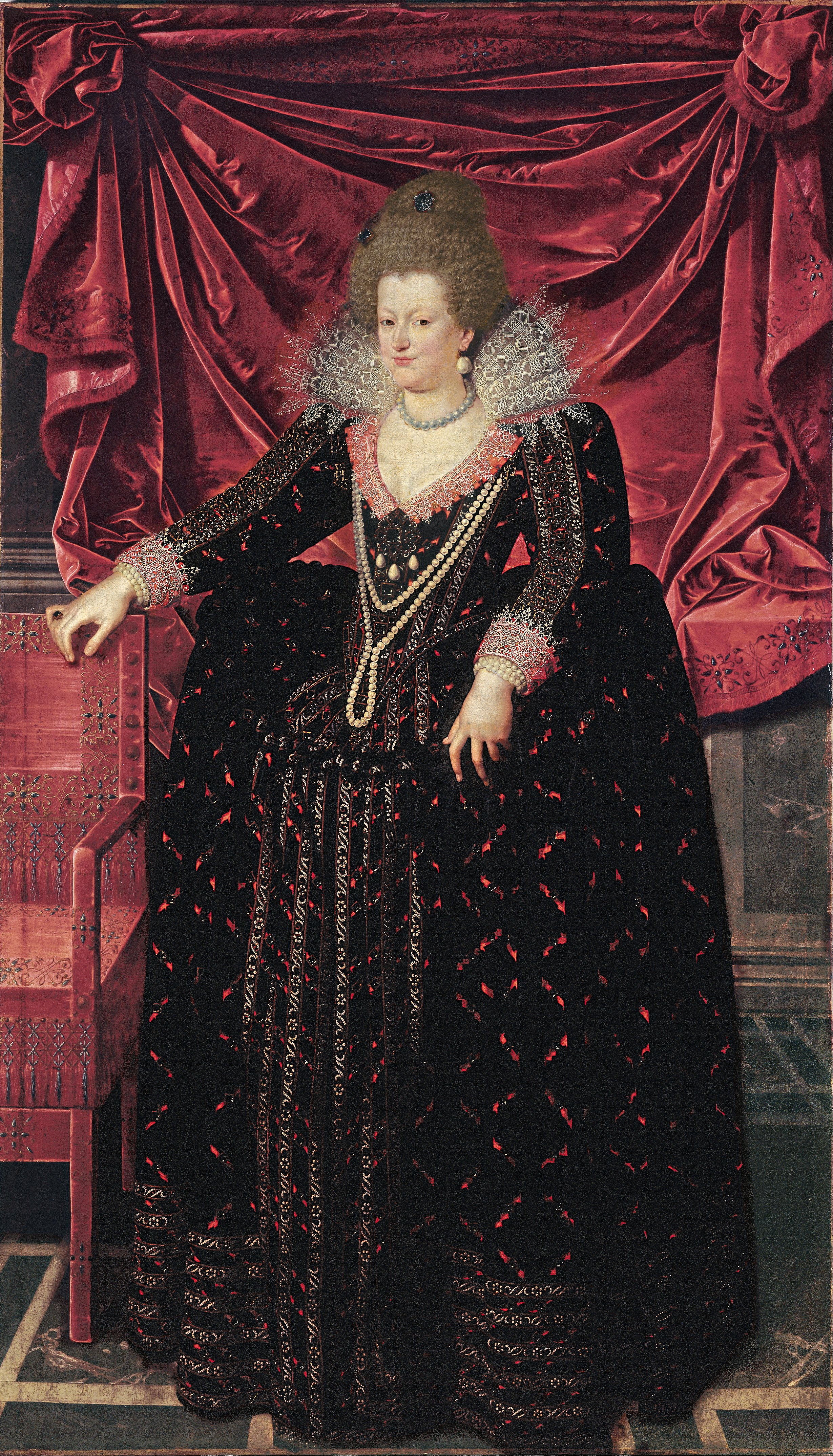 Retrato de la reina María de Médici (1575-1642), que fue reina consorte de Francia por su matrimonio con el rey Enrique IV de Francia y era hija de Francisco I de Médici, gran duque de Toscana, y de Juana de Habsburgo-Jagellón.